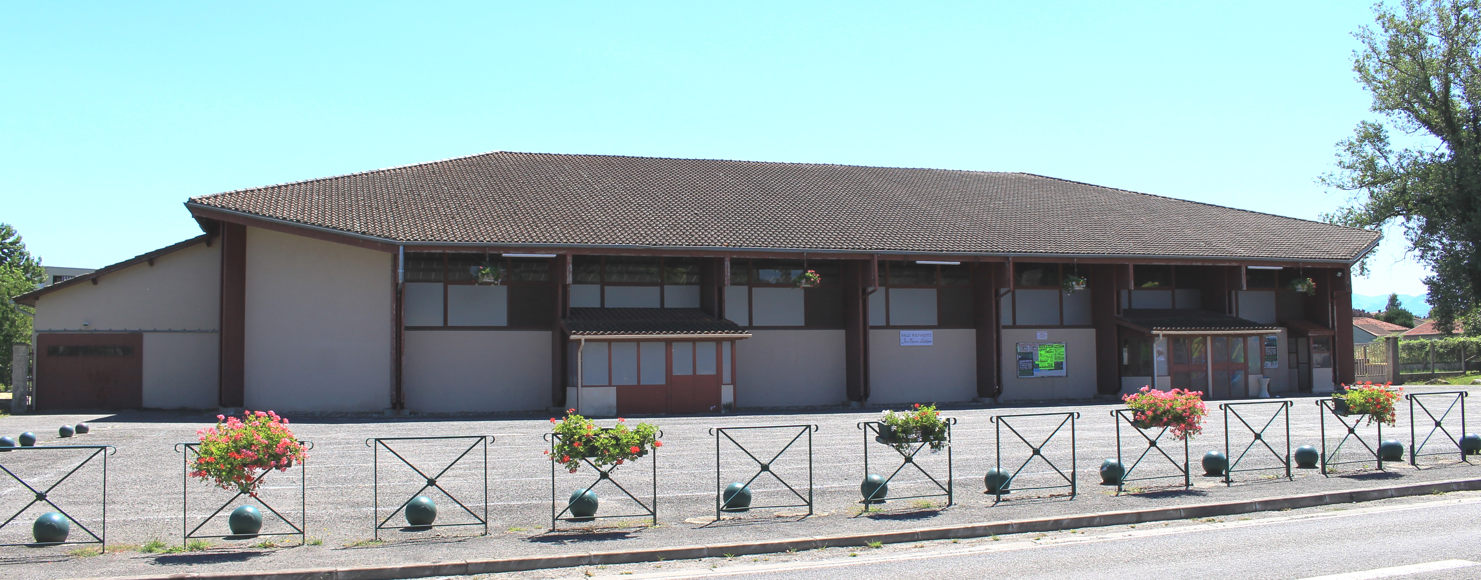 Salle des fêtes de Soues (Hautes-Pyrénées)